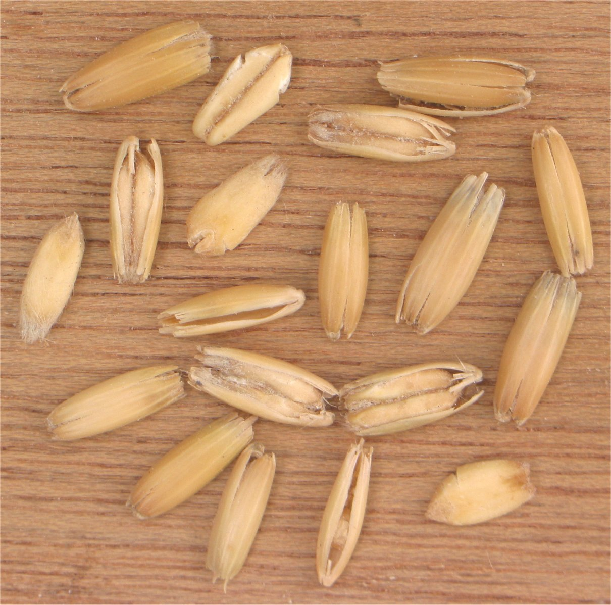 (Haverkorrels) Avena sativa